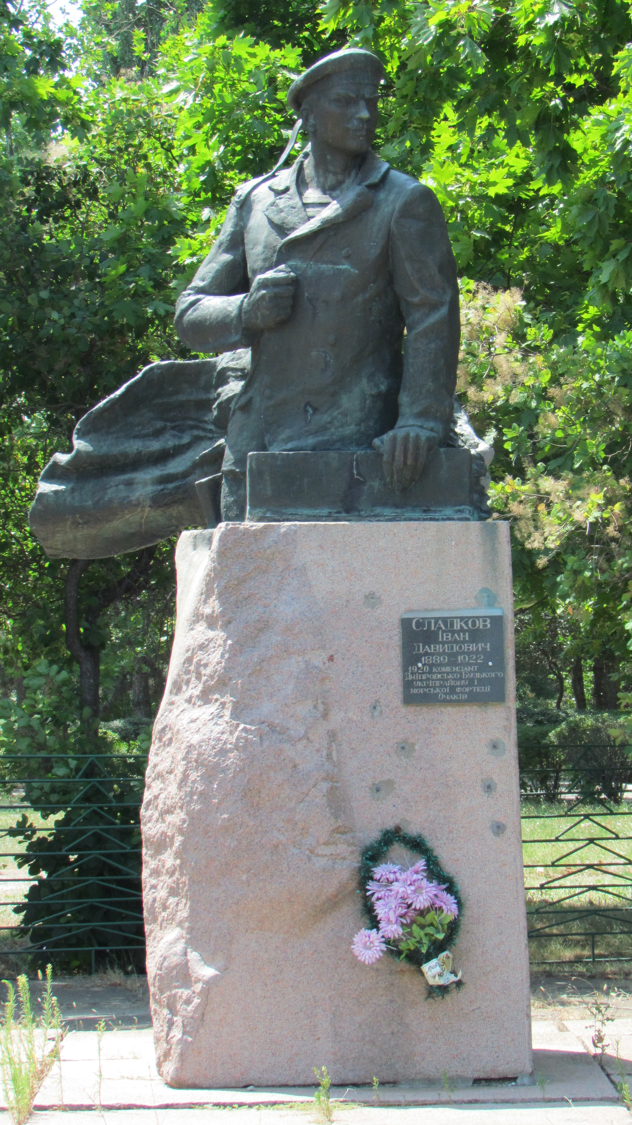 Очаків